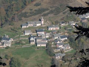 Village d'Ardengost (France - Hautes Pyrénées)